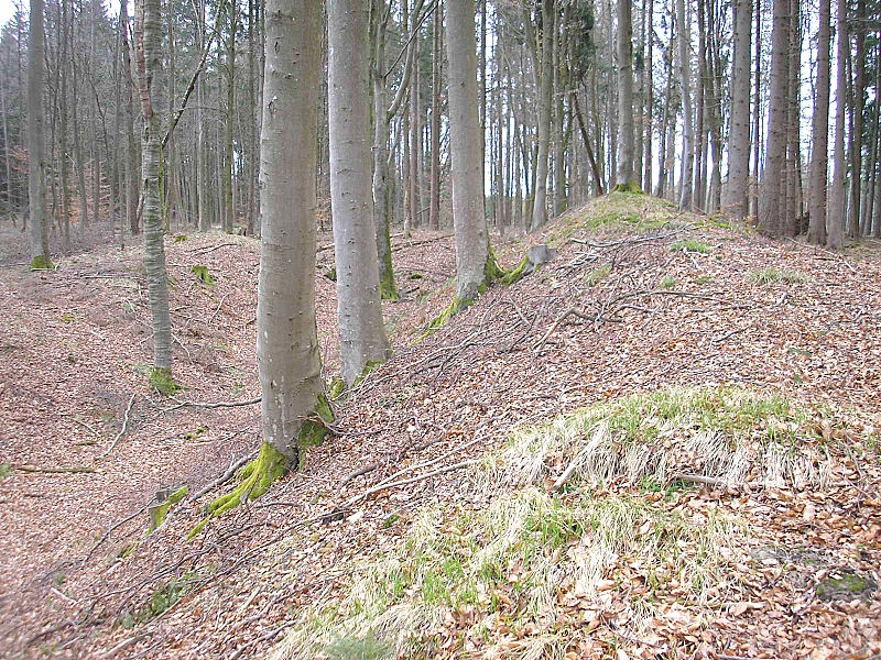 Frühmittelalterliche Schanze Wagesenberg bei Pöttmes (Landkreis Aichach-Friedberg, Bayerisch-Schwaben). Der Wall der westlichen Vorburg nach Norden. Eigene Aufnahme, März 2008 / Early Middle Ages hillfort Wagesenberg near Poettmes (Landkreis Aichach-Friedberg, Bavaria, Germany). The earthworks of the western bailey, looking north. Own photo, March 2008